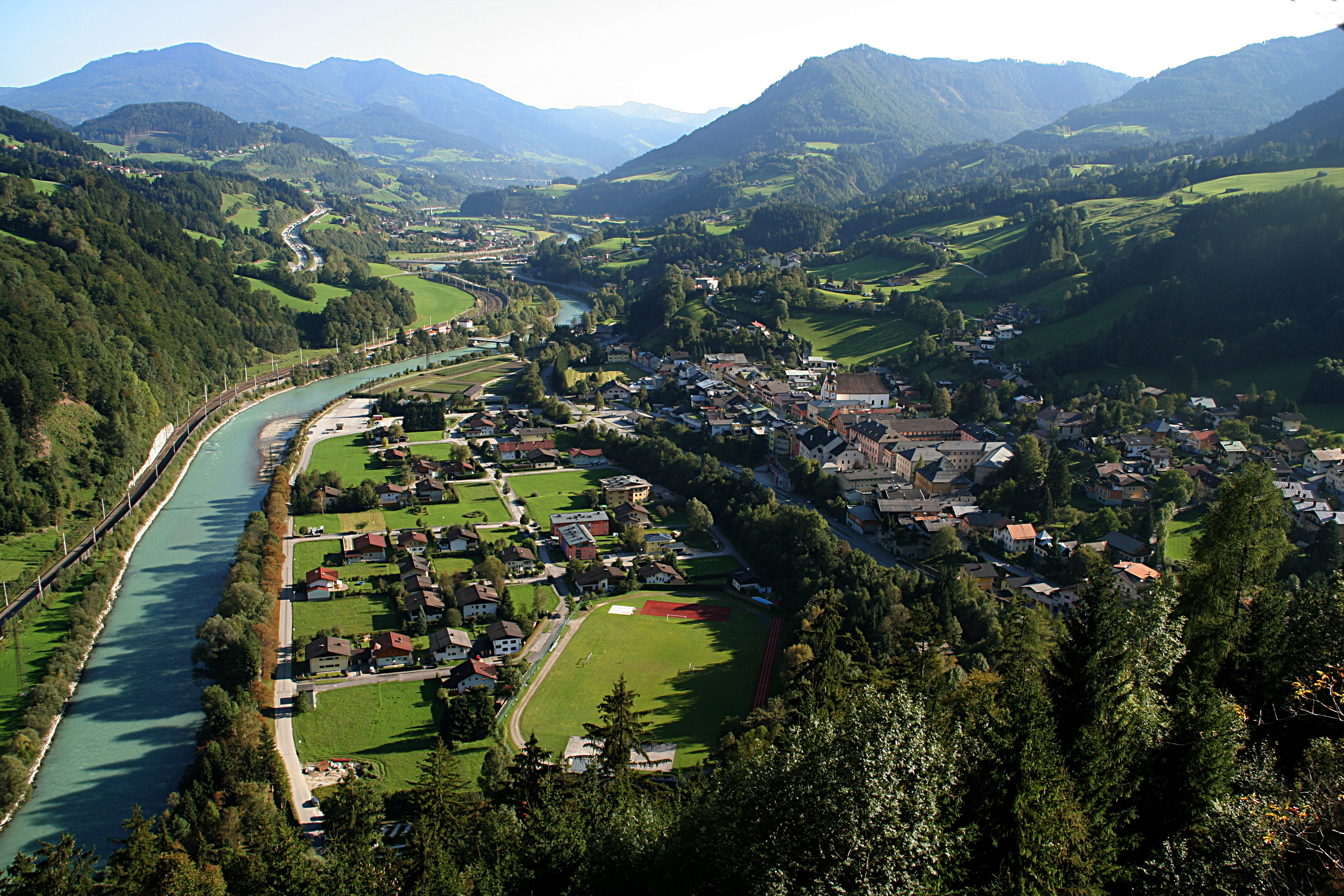 Werfen, view from castle Hohenwerfen